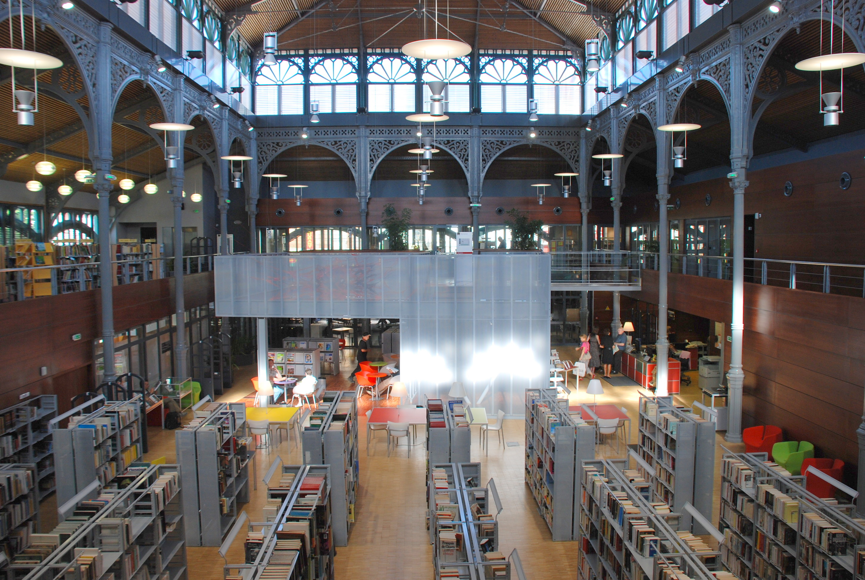 Salle de présentation et de lecture de la médiathèque de la CCPL (communauté de communes du pays de lourdes), place du Champ commun, à Lourdes, Hautes-Pyrénées. Aménagement mettant en valeur l'architecture métallique et les verrières conçues pour des halles,au XIXème siècle.